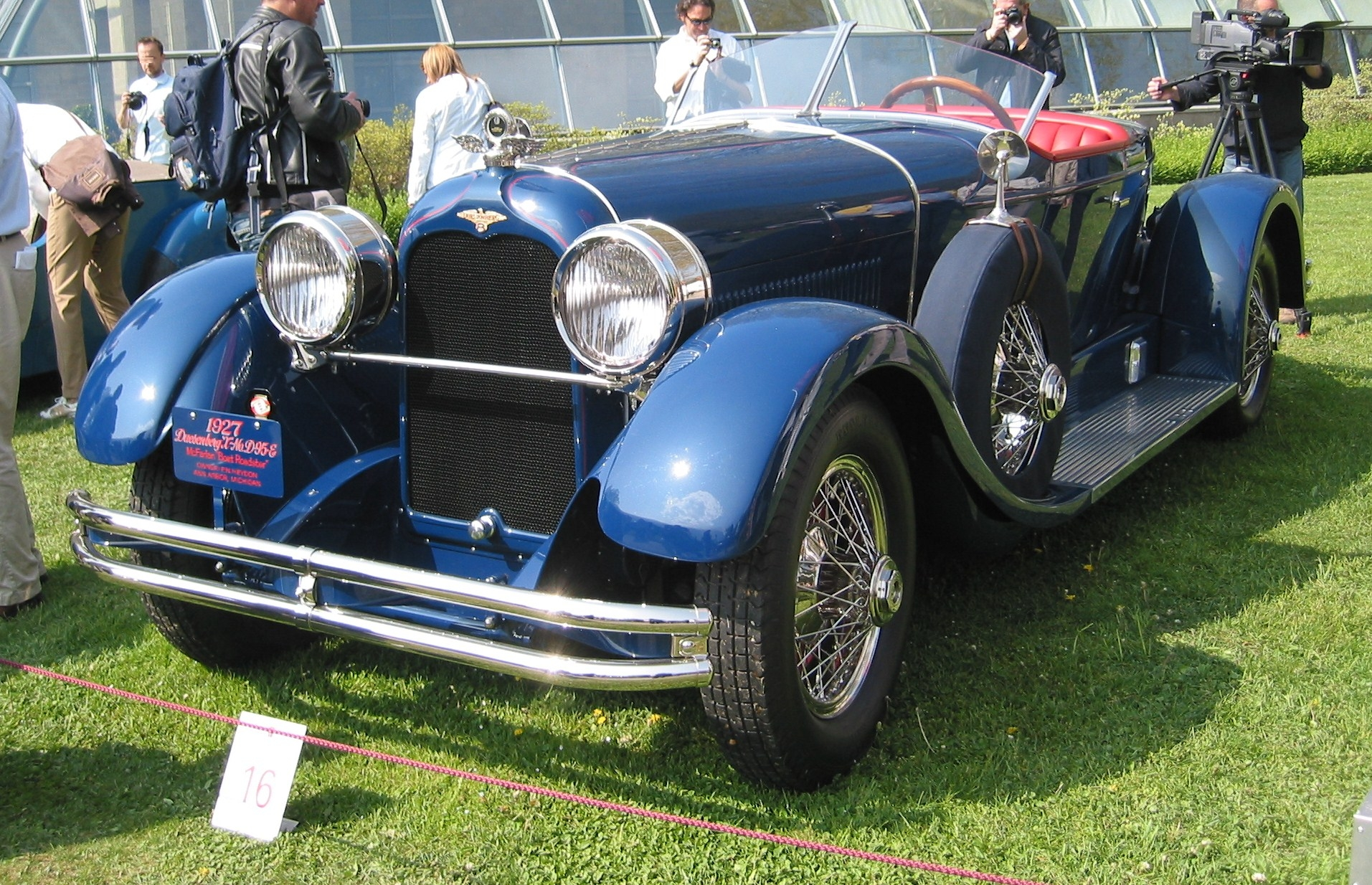 Duesenberg X Straight 8 von McFarlan von 1927.